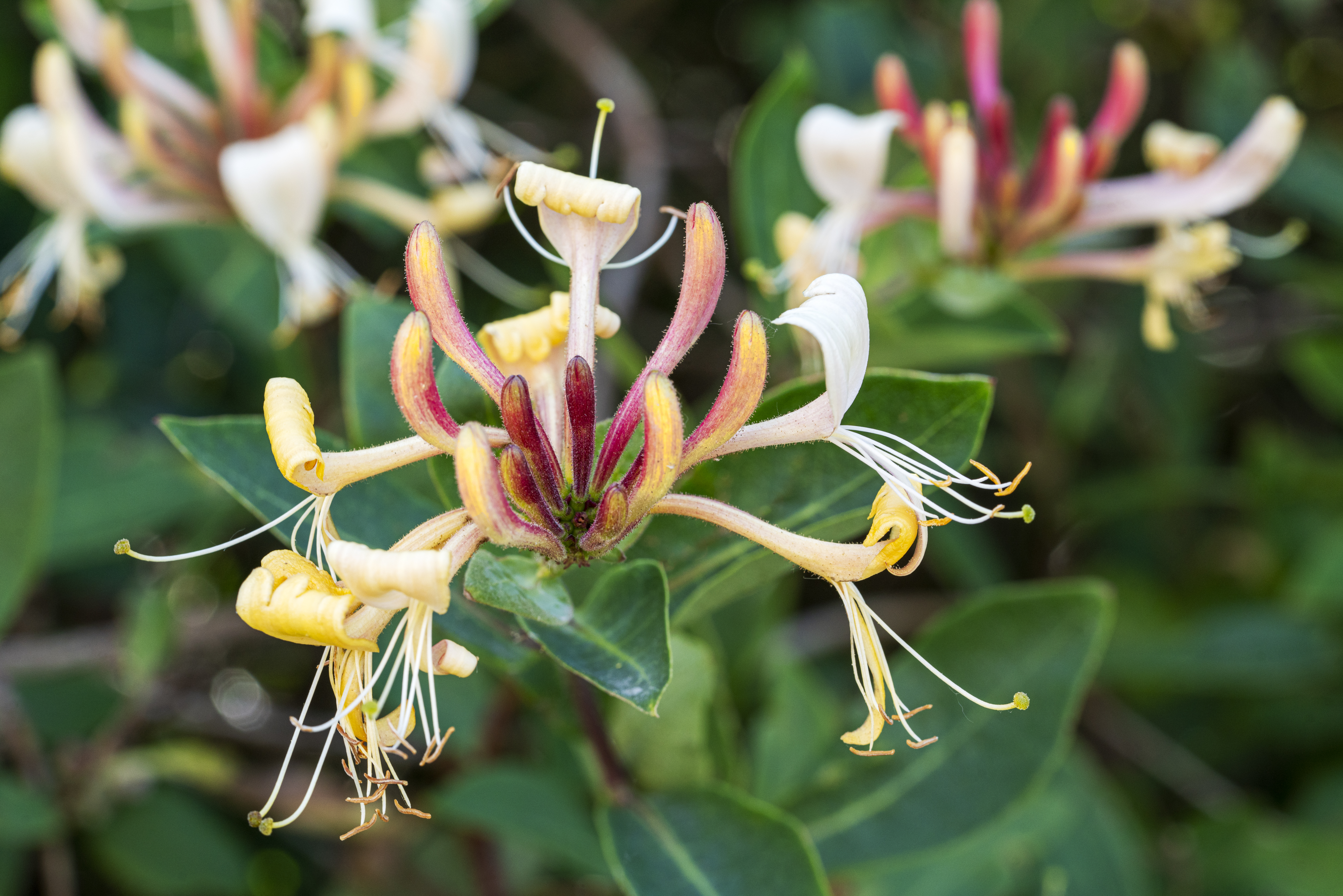 Fleur de Chèvrefeuille dans un terrain vague parmi des muriers lors d'une promenade à Sainte Cécile Plage (Camiers Pas-de-Calais - France